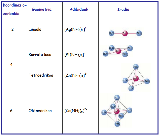 Koordinazio-zenbakiaren araberako ioi konplexuaren geometria